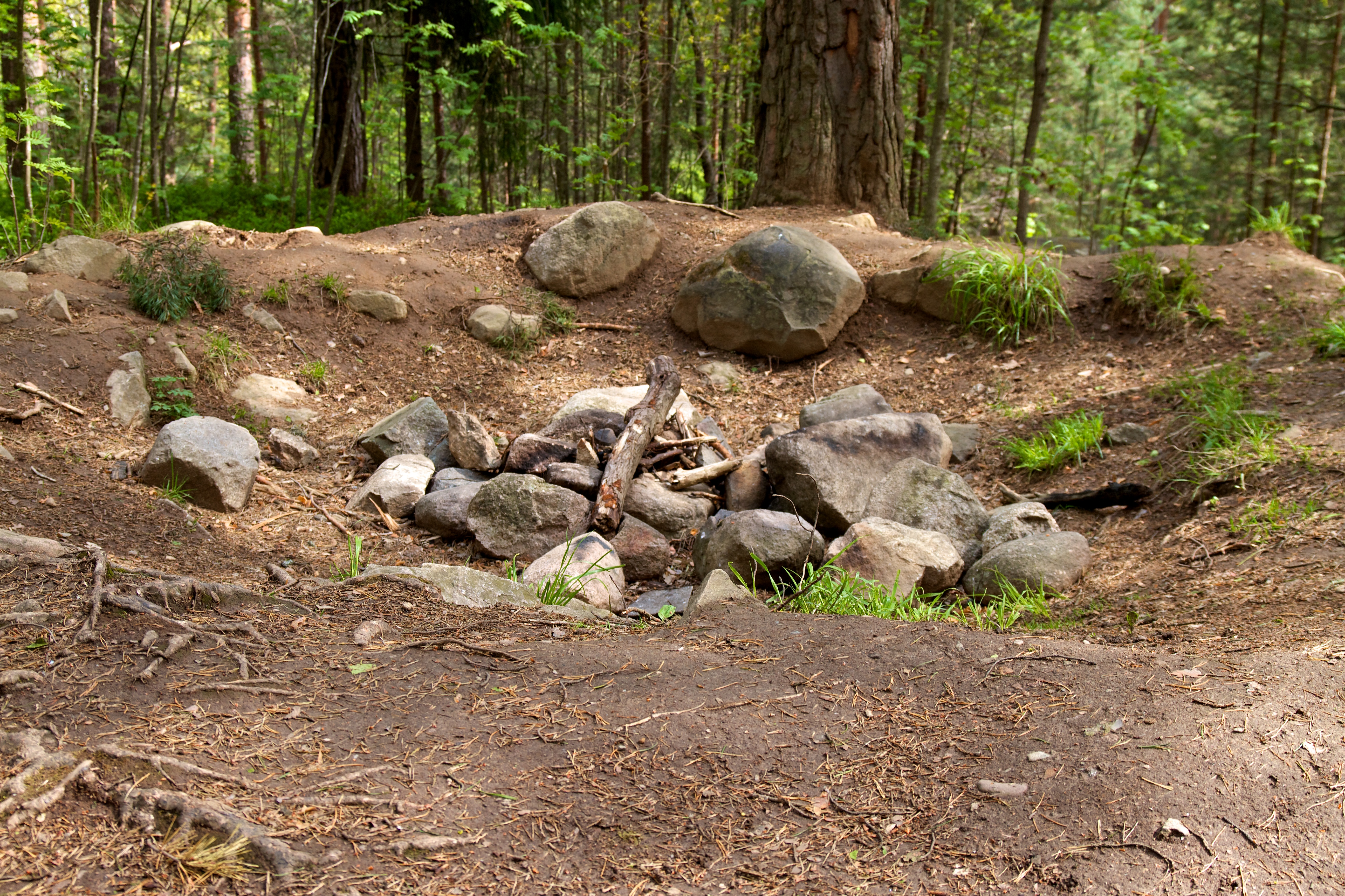 Gravplass fra jernalderen. Tallberget i Bydel Østensjø i Oslo.